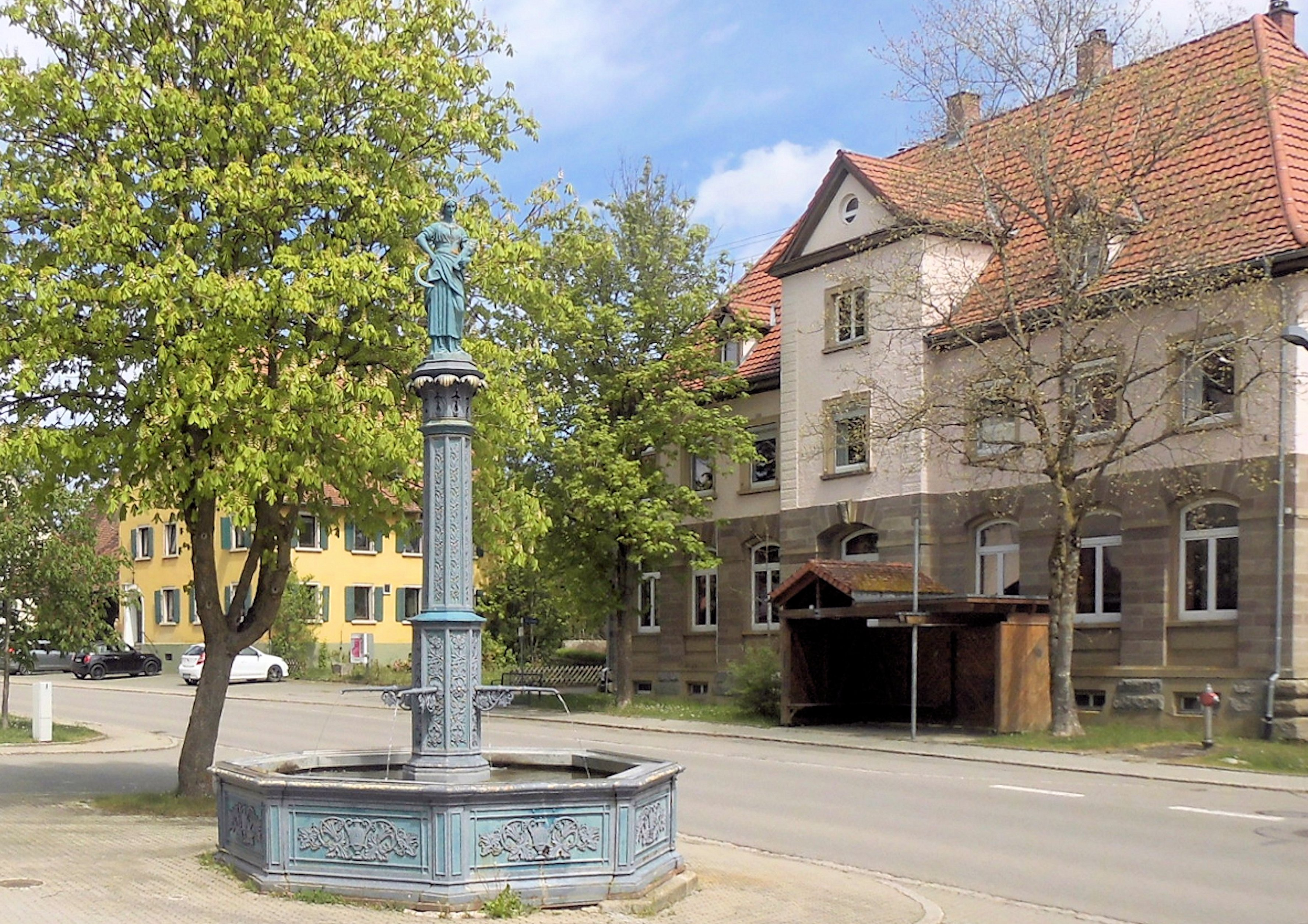 Brunnen aus dem Jahr 1878 in Sunthausen, Stadt Bad Dürrheim, Deutschland